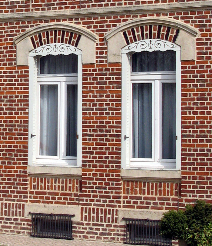 Beauval (Somme, France) - Lambrequins décorant les fenêtres. Les lambrequins sont ici en métal et font corps avec le bâti des volets.